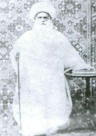 Qafqaza 32 il şeyxülislamlıq etmiş Axund Əhməd Səlyani